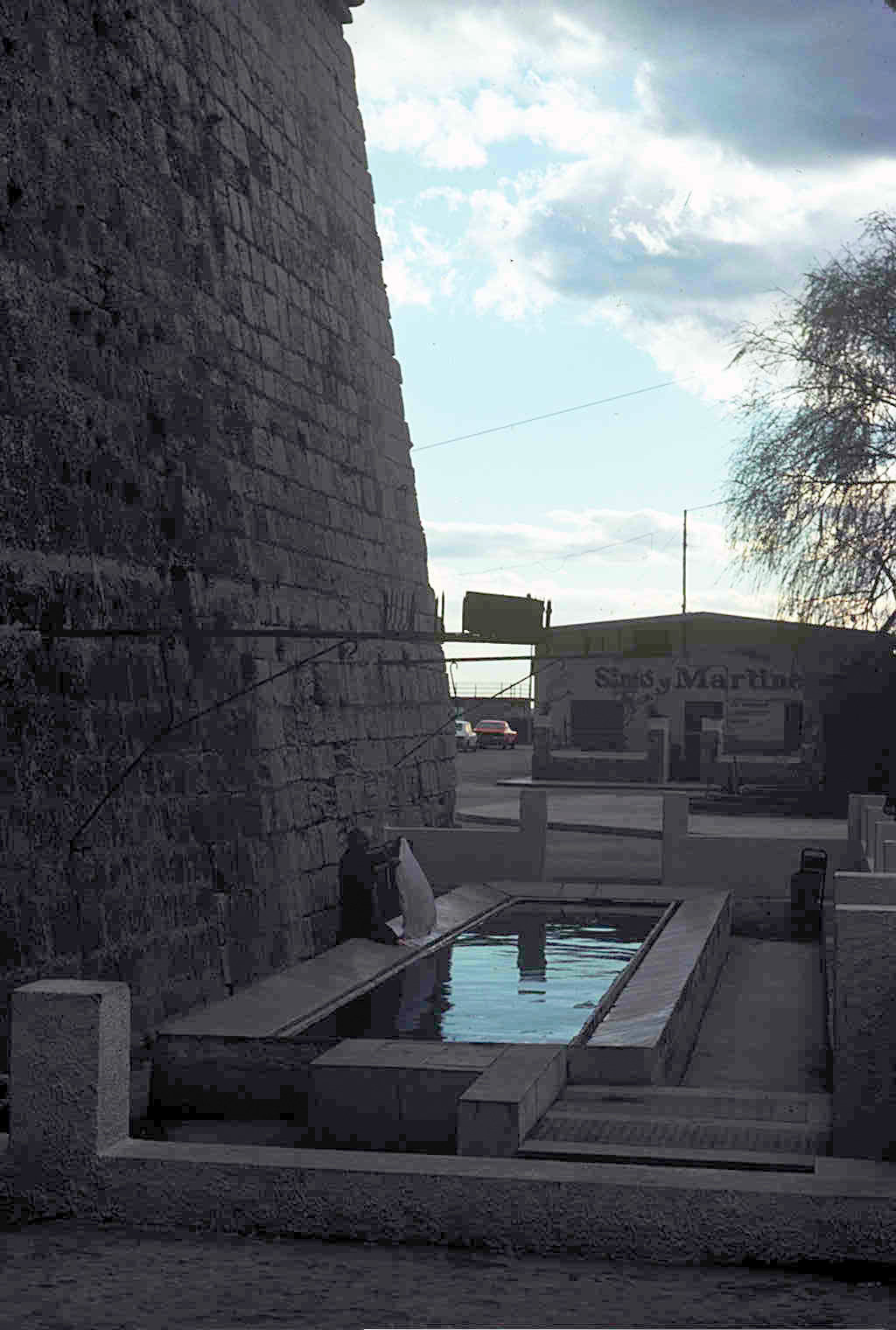 Lavadero municipal de Peñíscola, año 1978